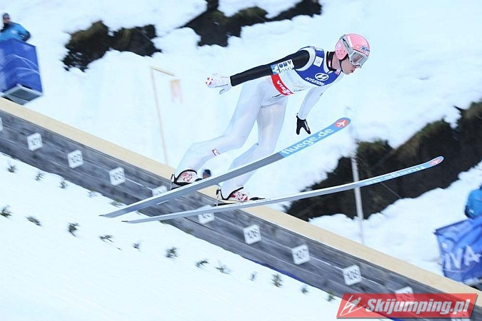 Konkurs drużynowy mężczyzn na skoczni K-120